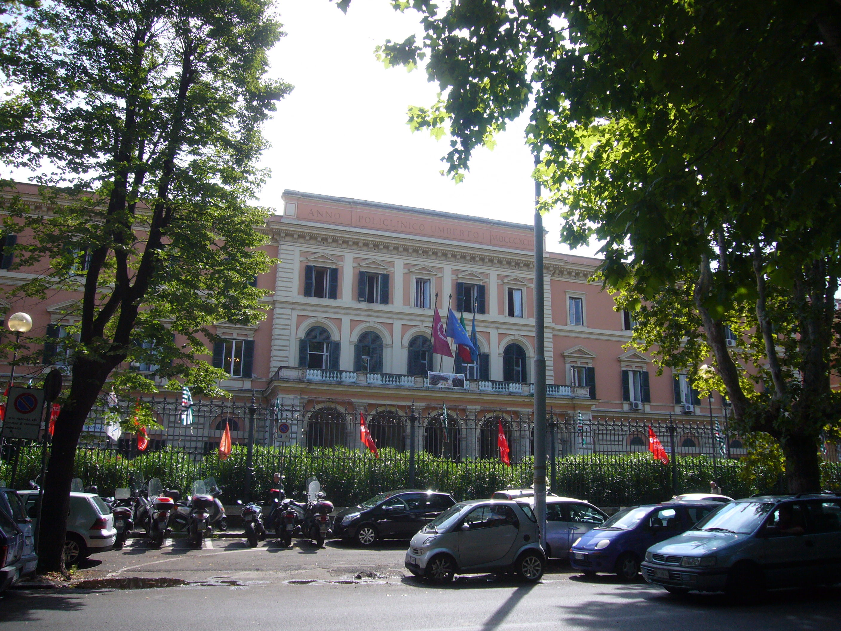 Roma, Policlinico Umberto I edificio della direzione (1893))